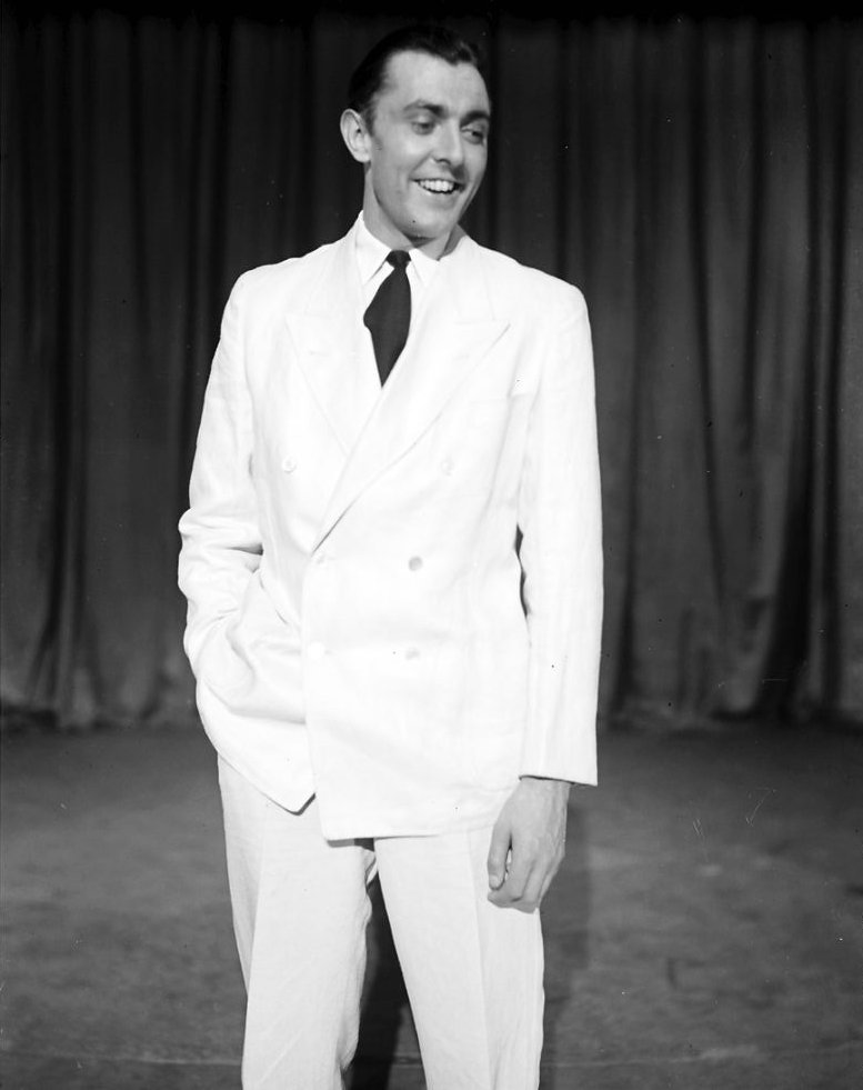 Kabarett der Komiker: Jacques Tati